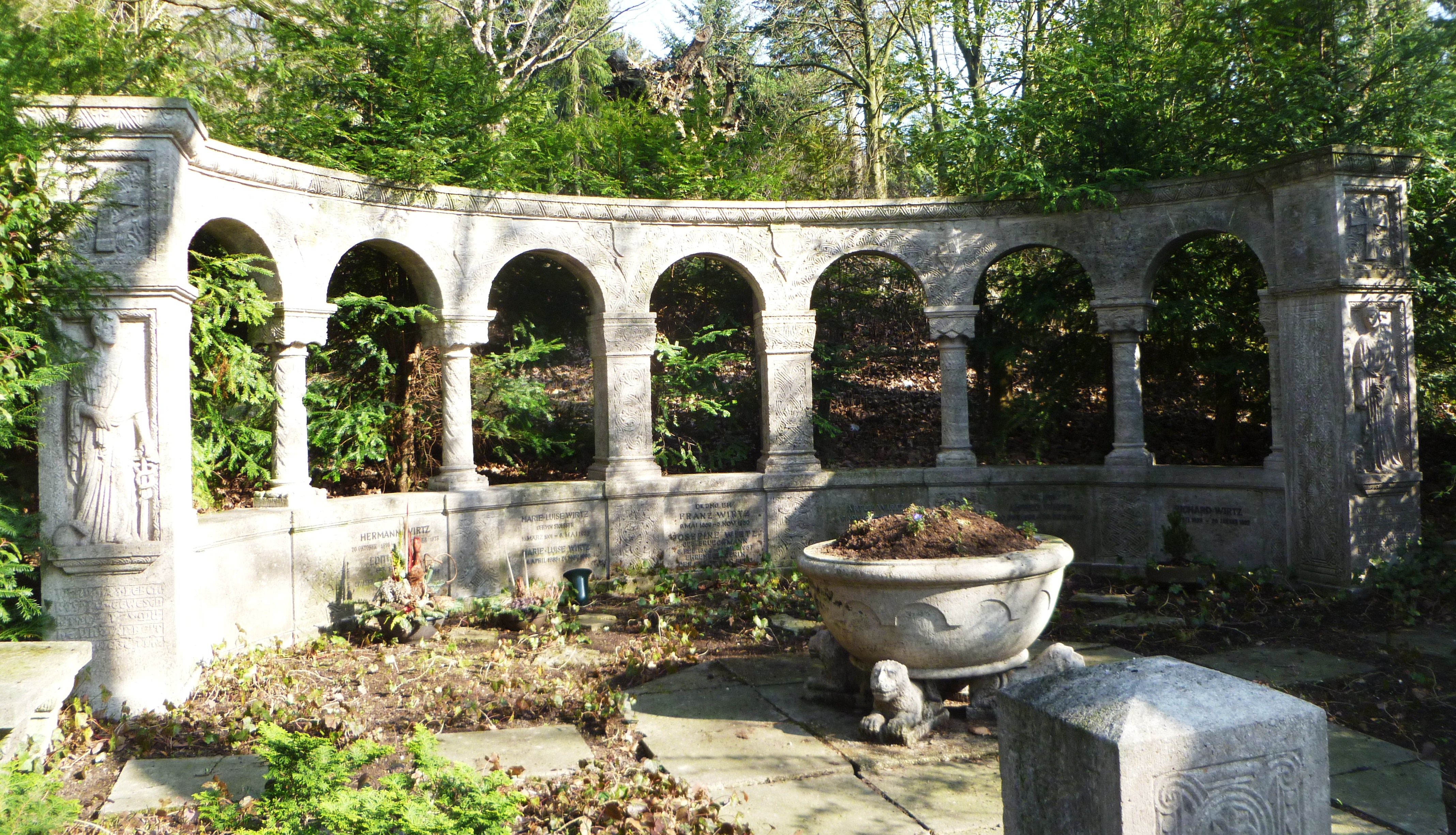 Grabstätte Fam. Wirtz, Stolberg i. Rheinland